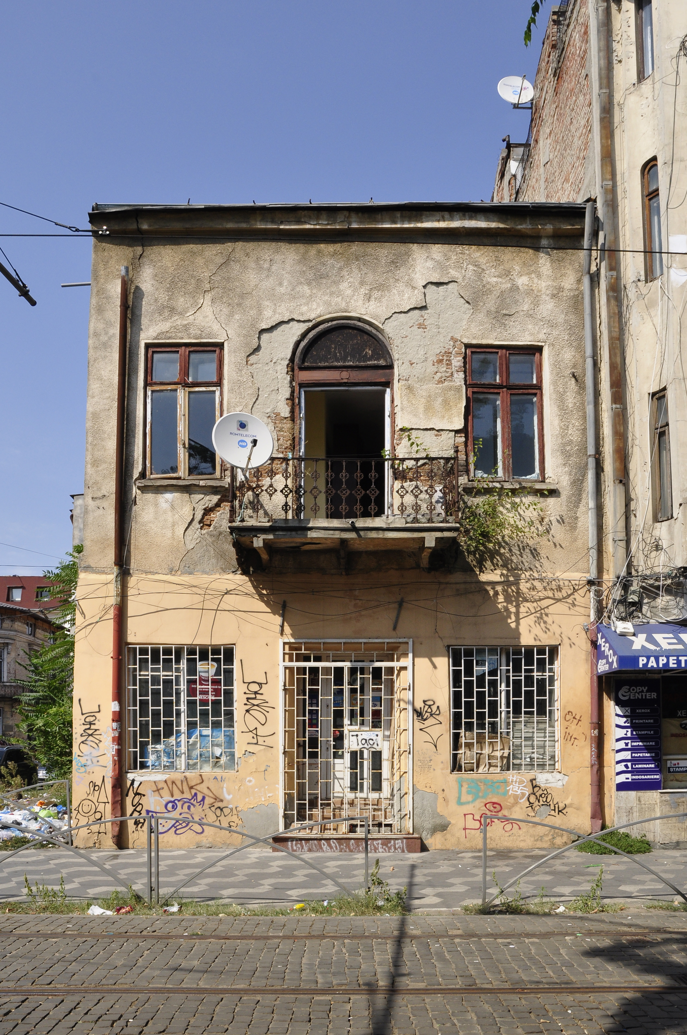 Casă - Str. Băniei 11